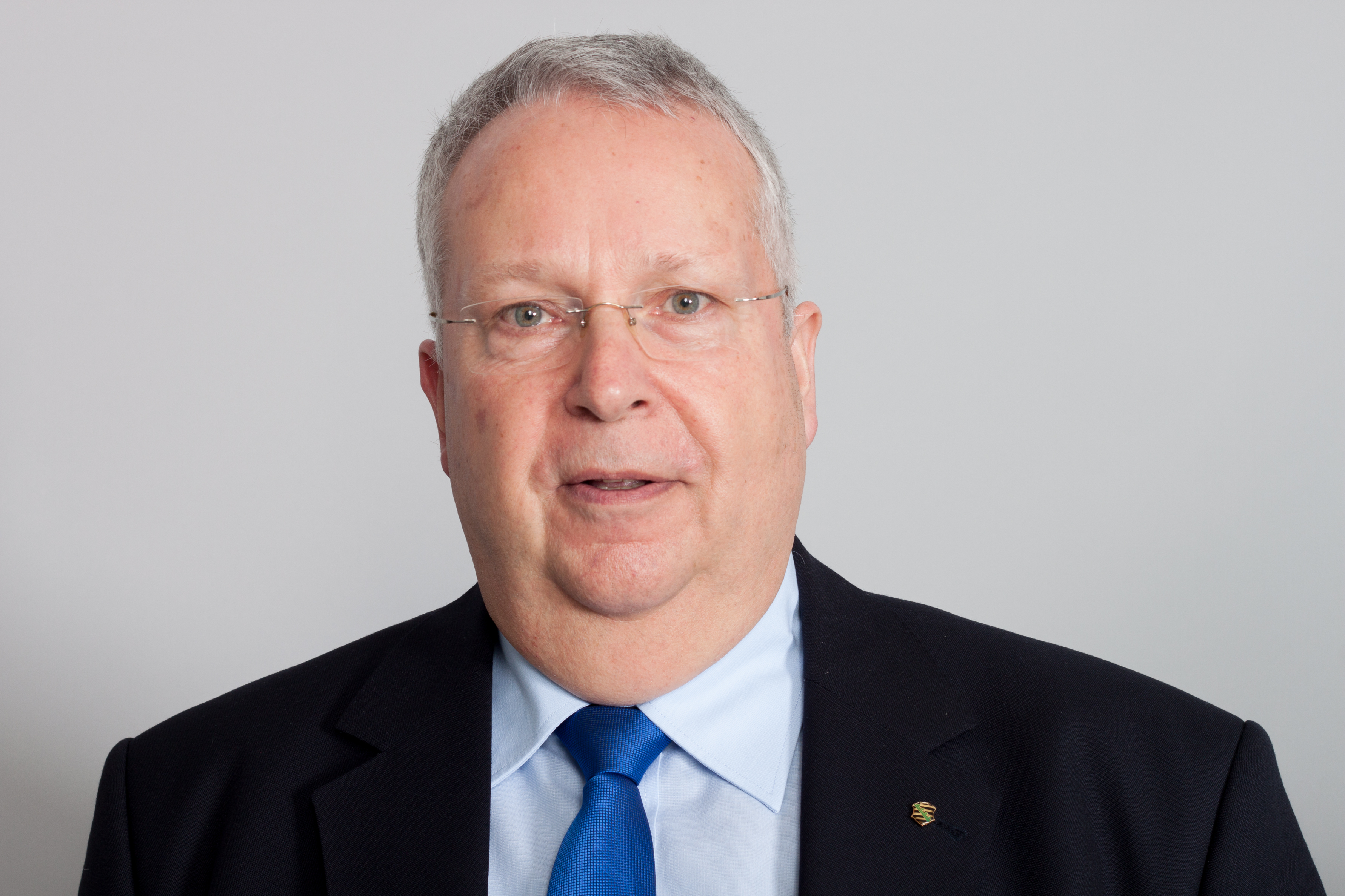 Abgeordneter des Sächsischen Landtages Geert Mackenroth